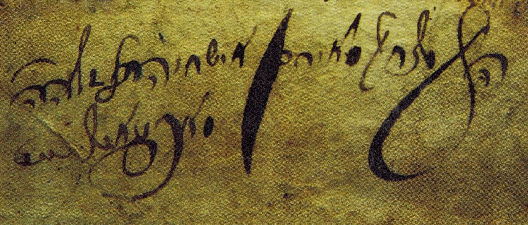 חתימת כתי"ק של רבי יצחק מאיר השיל מז'ינקוב